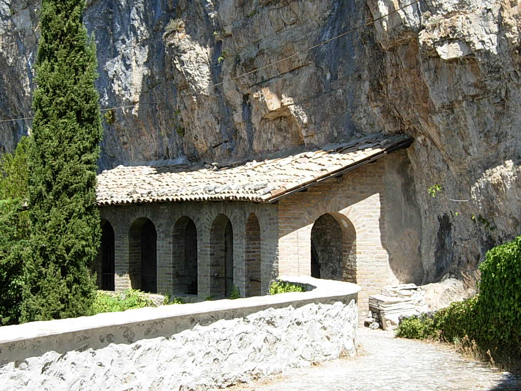 Eremo di Sant'Onofrio al Morrone Foto personale concessa in PD